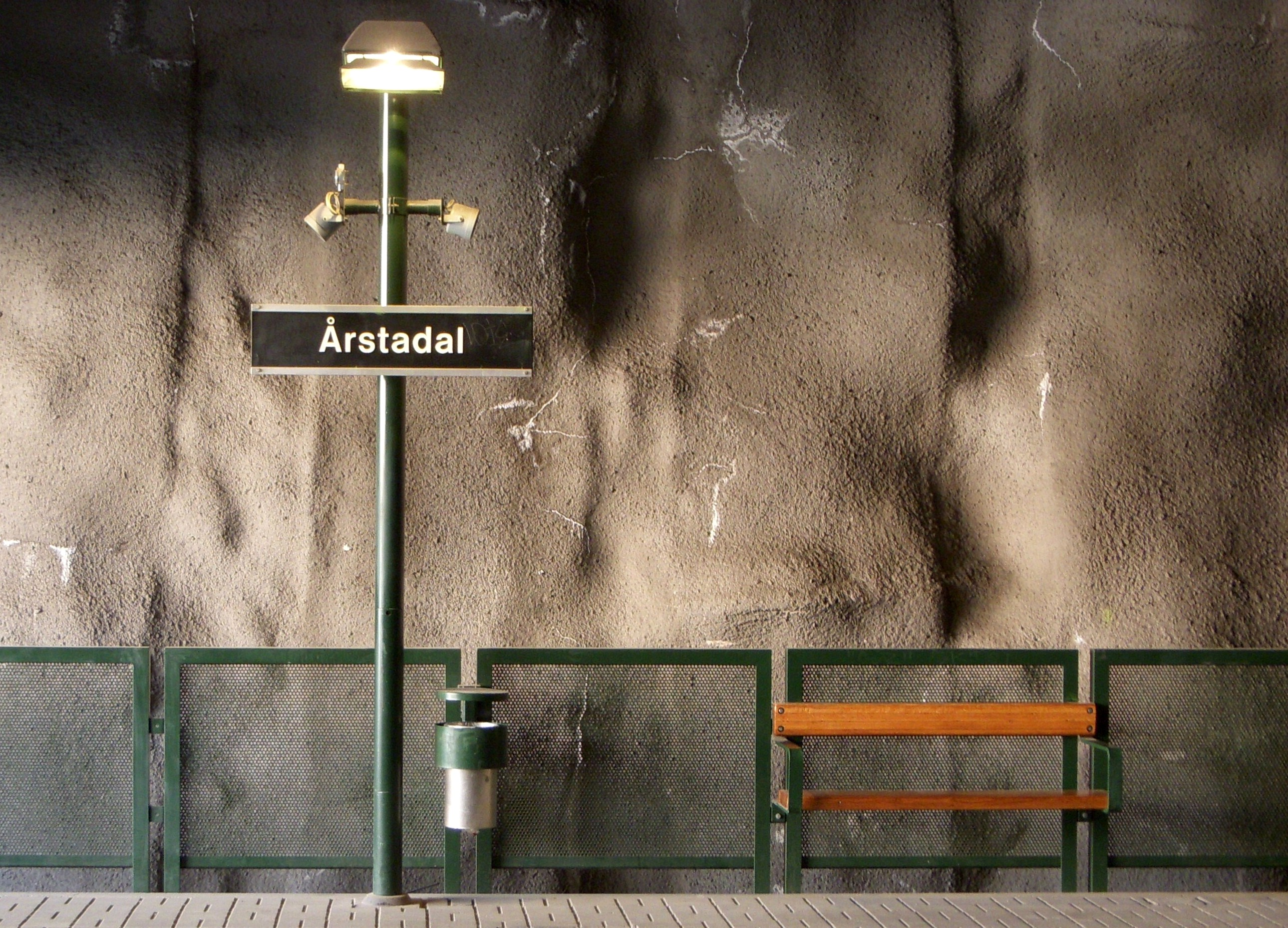 Årstadal, Stockholm, Tvärbanans hållplats